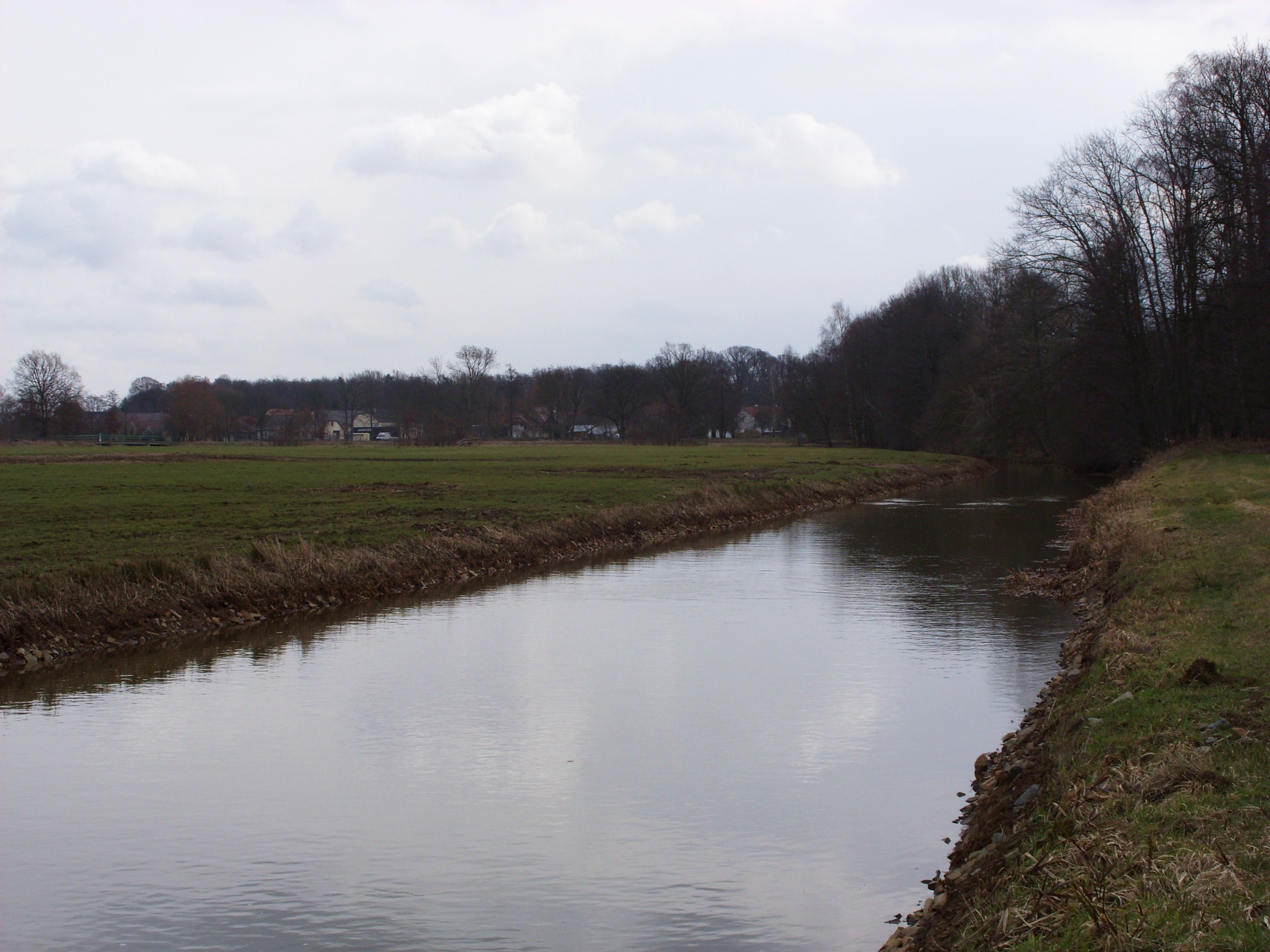 Die Kleine Spree bei Hermsdorf/Spree, Gemeinde Lohsa, Landkreis Bautzen. Hornjoserbsce: Mała Sprjewja pola Hermanec, gmejna Łaz, wokrjes Budyšin.